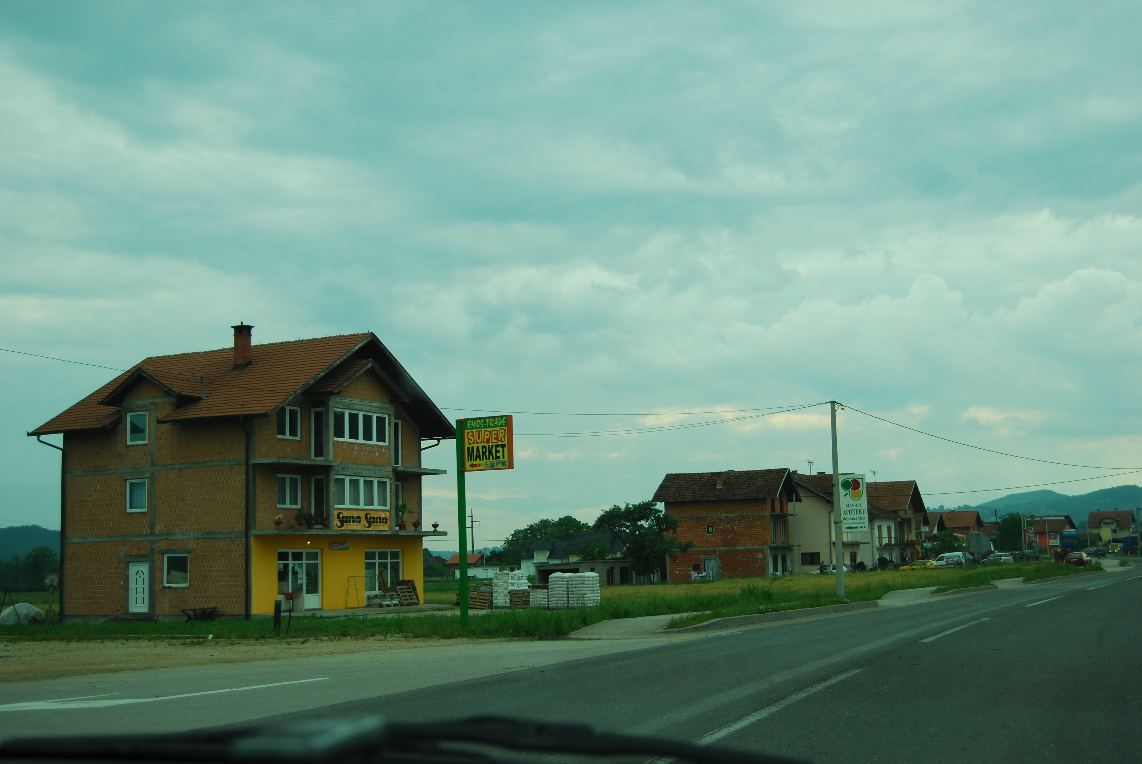 Vakolatlan h�z Bosznia szerb �s bosny�k r�sz�nek hat�r�n